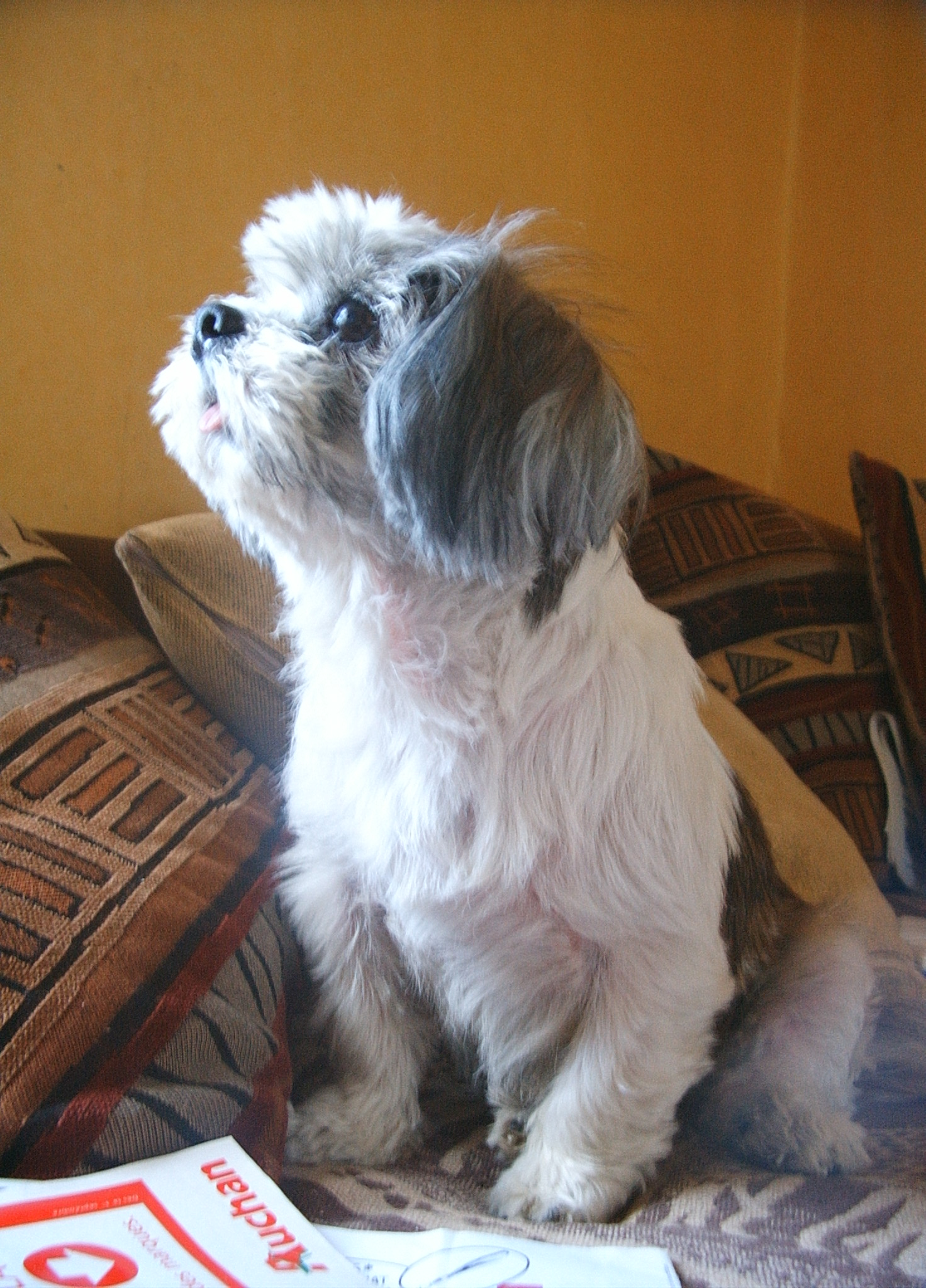 Photo personnelle